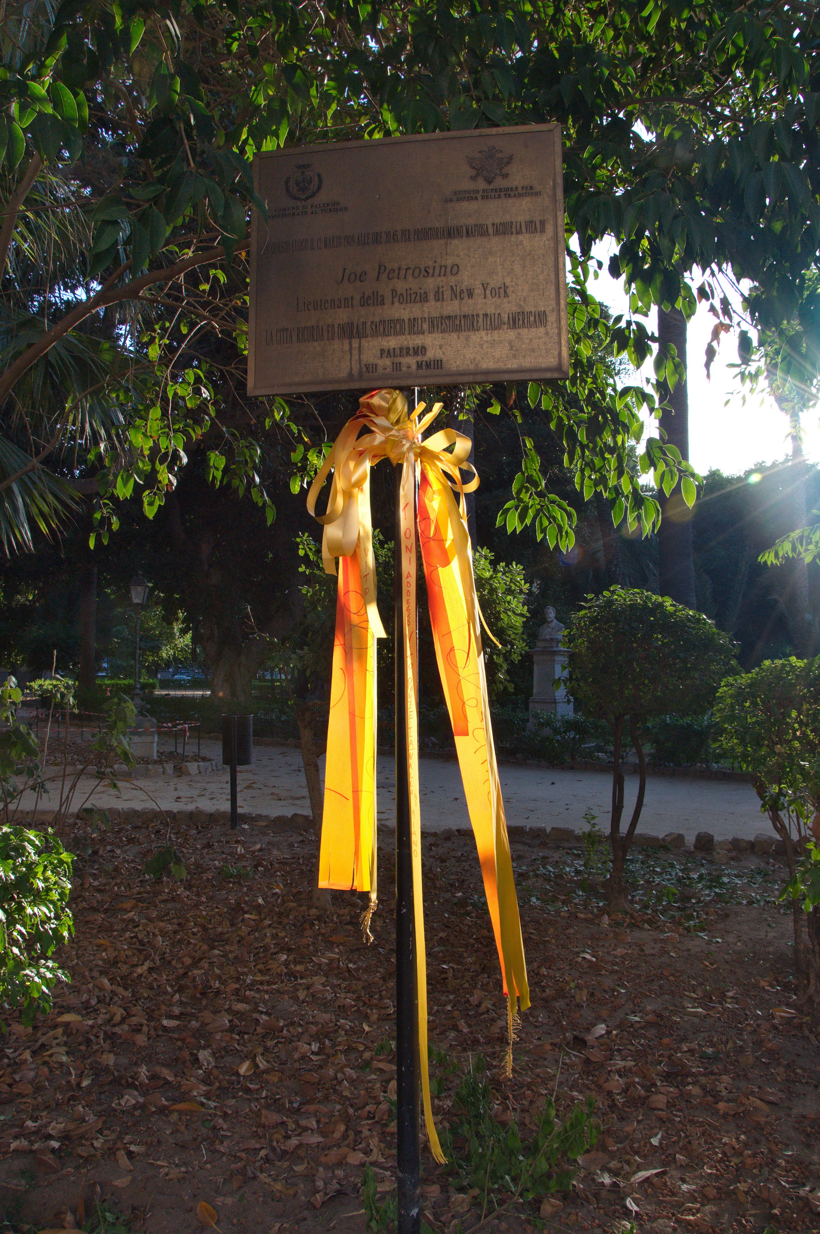 Targa in memoria dell'uccisione di Joe Petrosino nel Giardino Garibaldi di Palermo This is a photo of a monument which is part of cultural heritage of Italy.